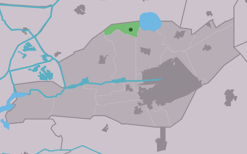 Kaartsje fan himrik fan De Tike